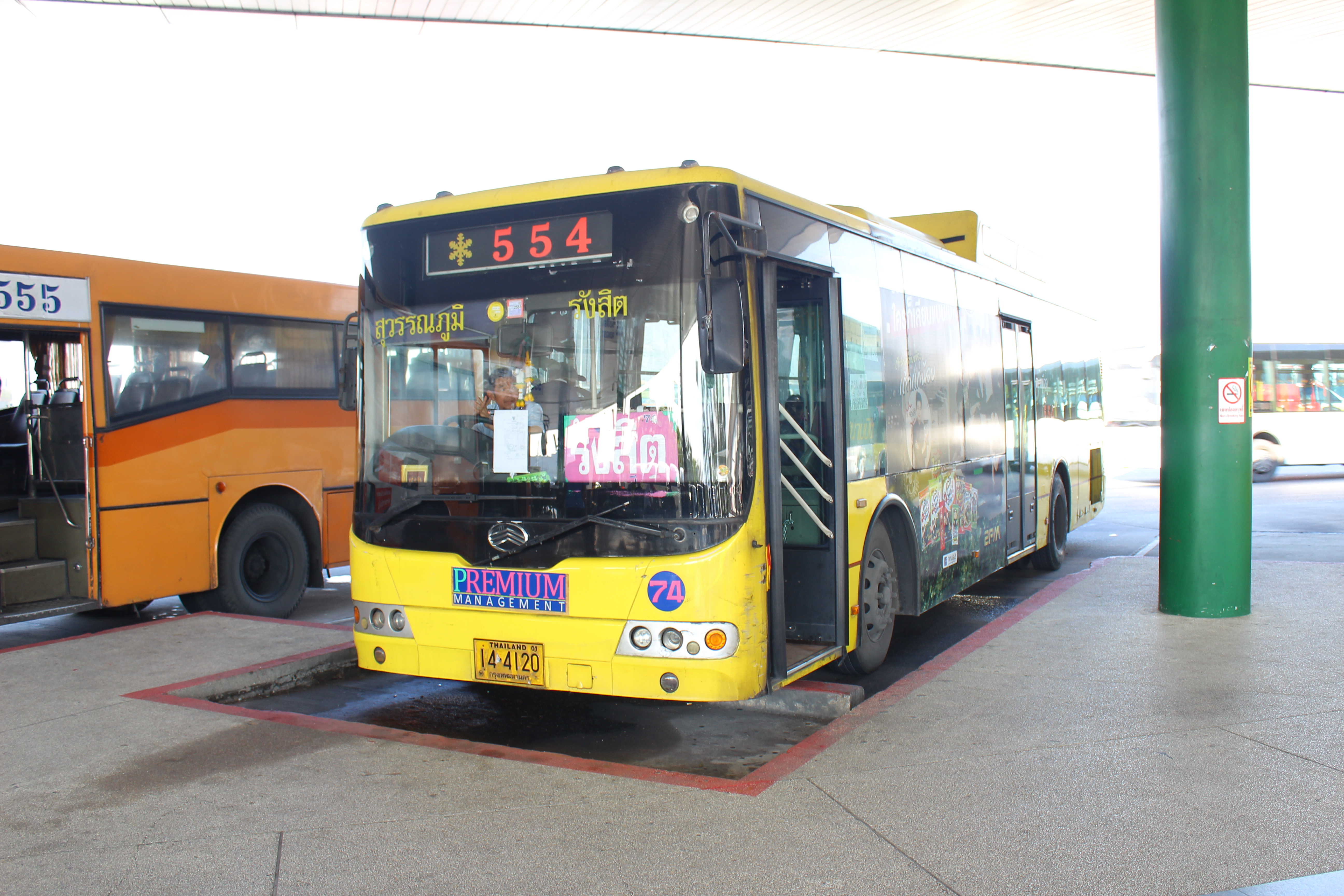 รถประจำทางสาย 554 ท่าอากาศยานสุวรรณภูมิ - ถนนรามอินทรา - รังสิต ให้บริการโดย บริษัท Premium Management จำกัด